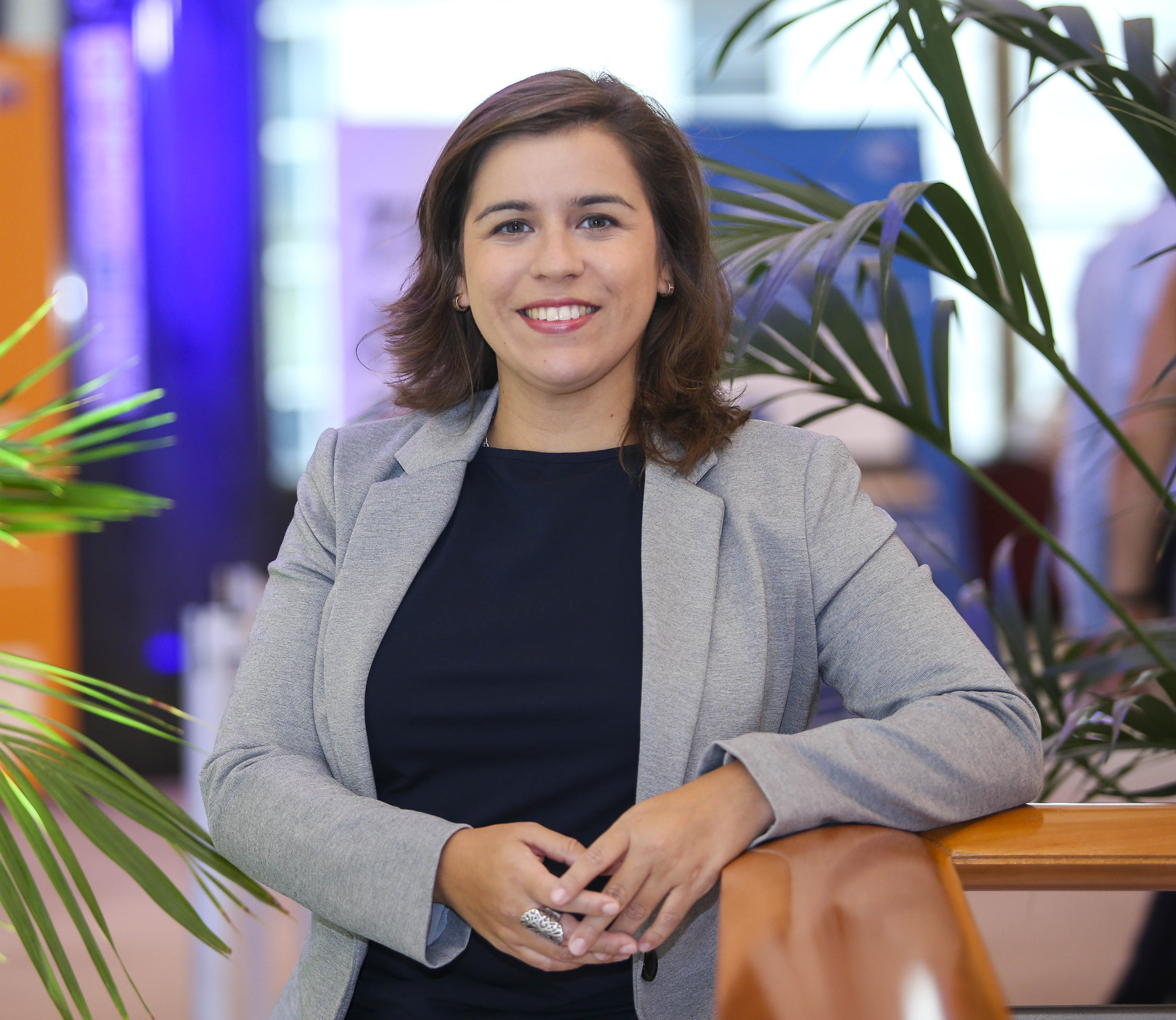 Sara Cerdas no Parlamento Europeu